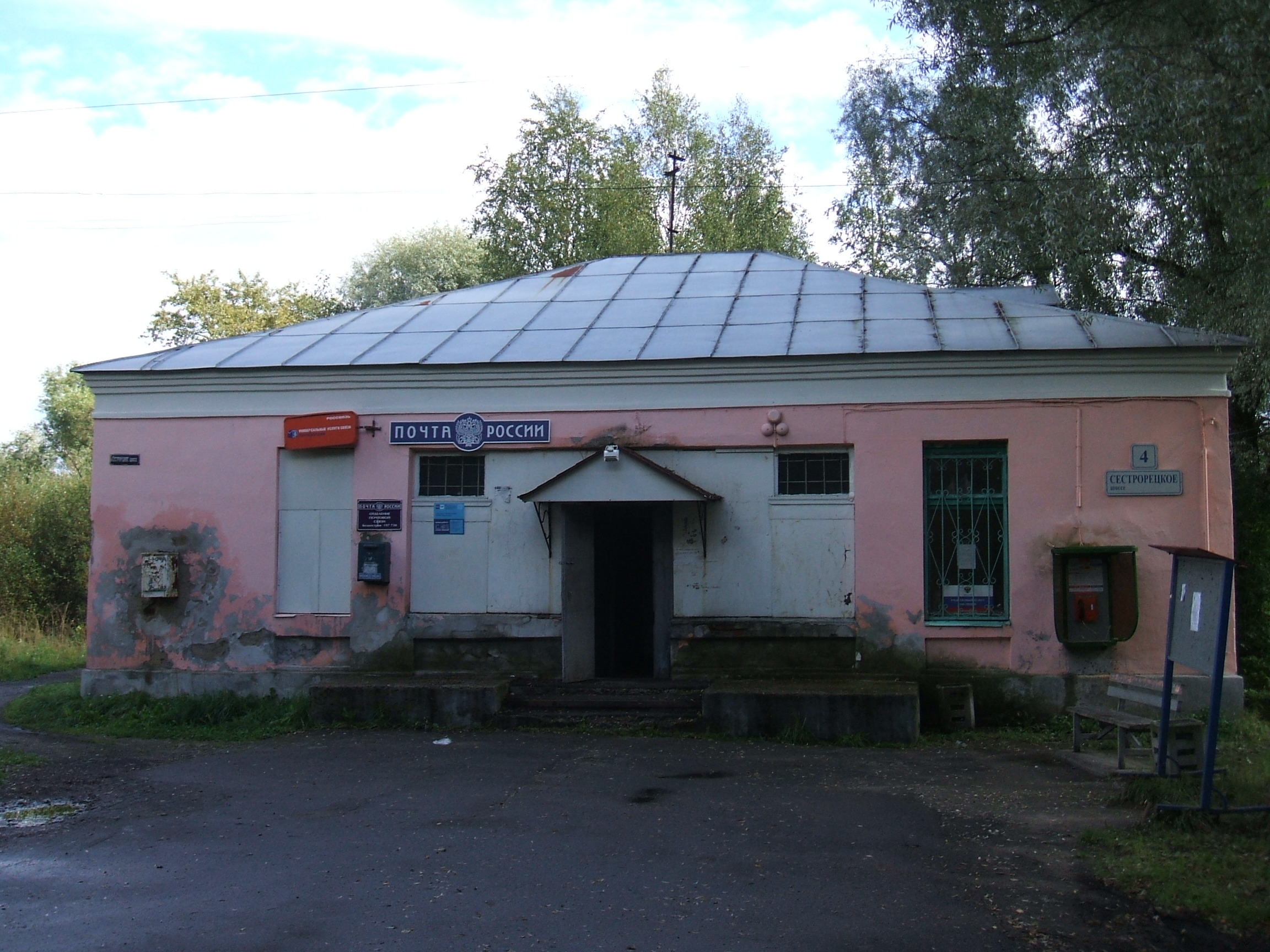 Белоостров СПб Здание почты 197730.